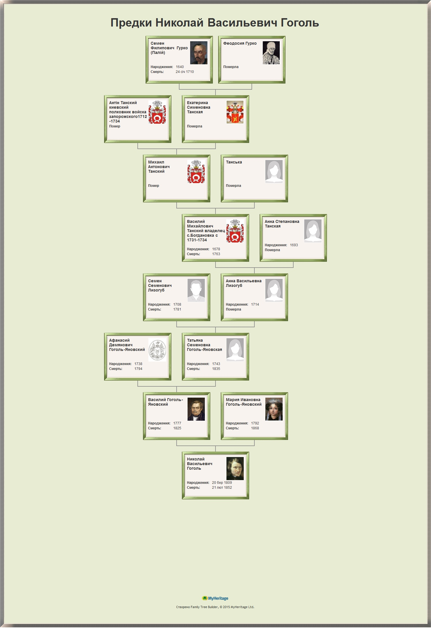 Микола Васильович Гоголь доводиться правнуком В.М.Танському.